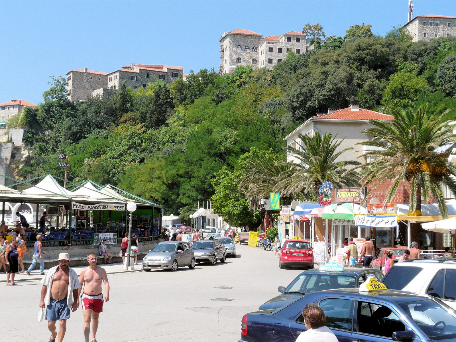 Ulcinj